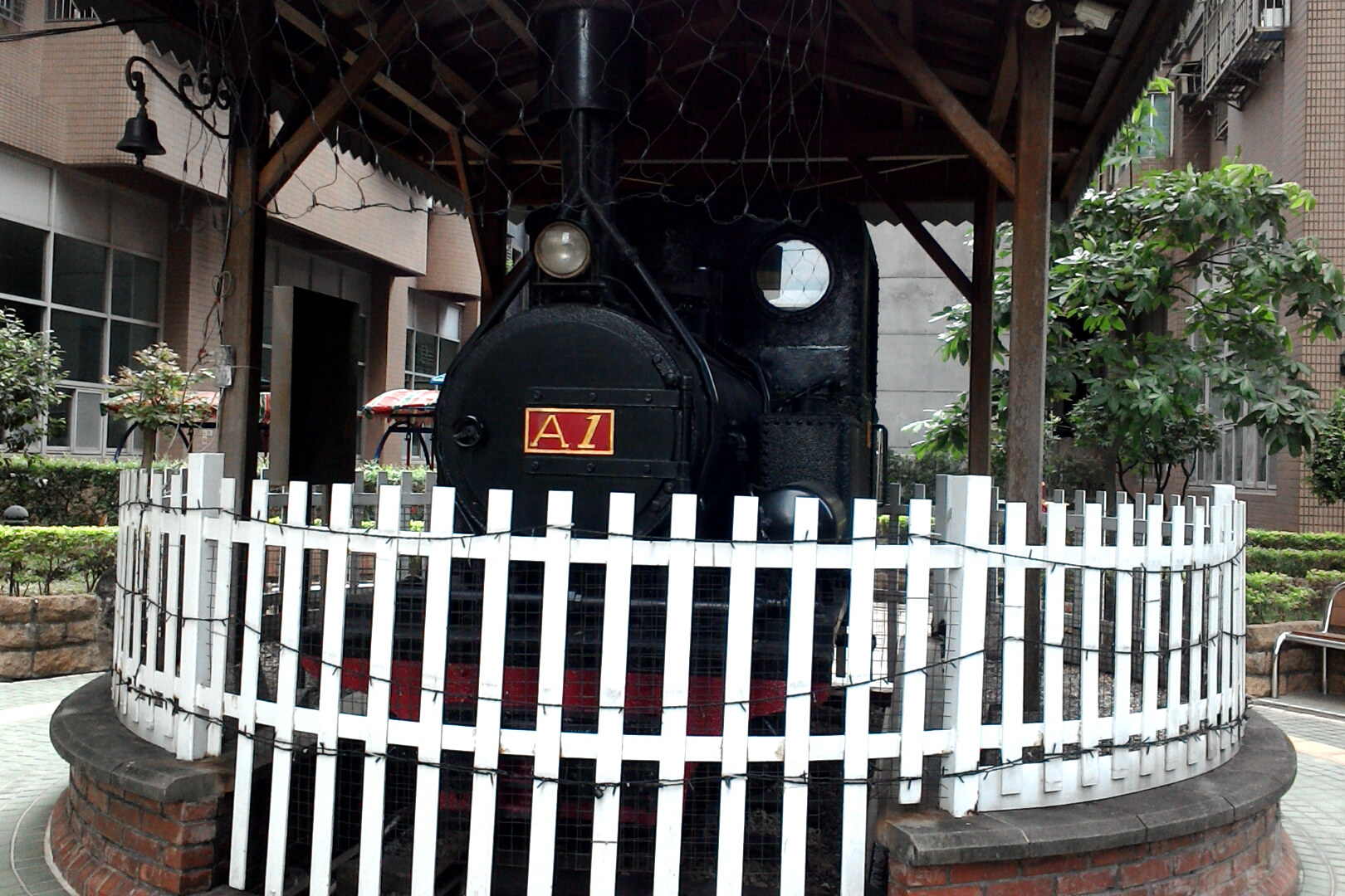 三峽炭礦A1號蒸汽機車,新北市中和區民生里